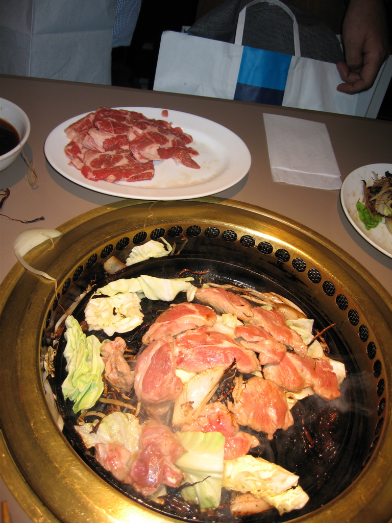 japanese barbecue Jingisukan